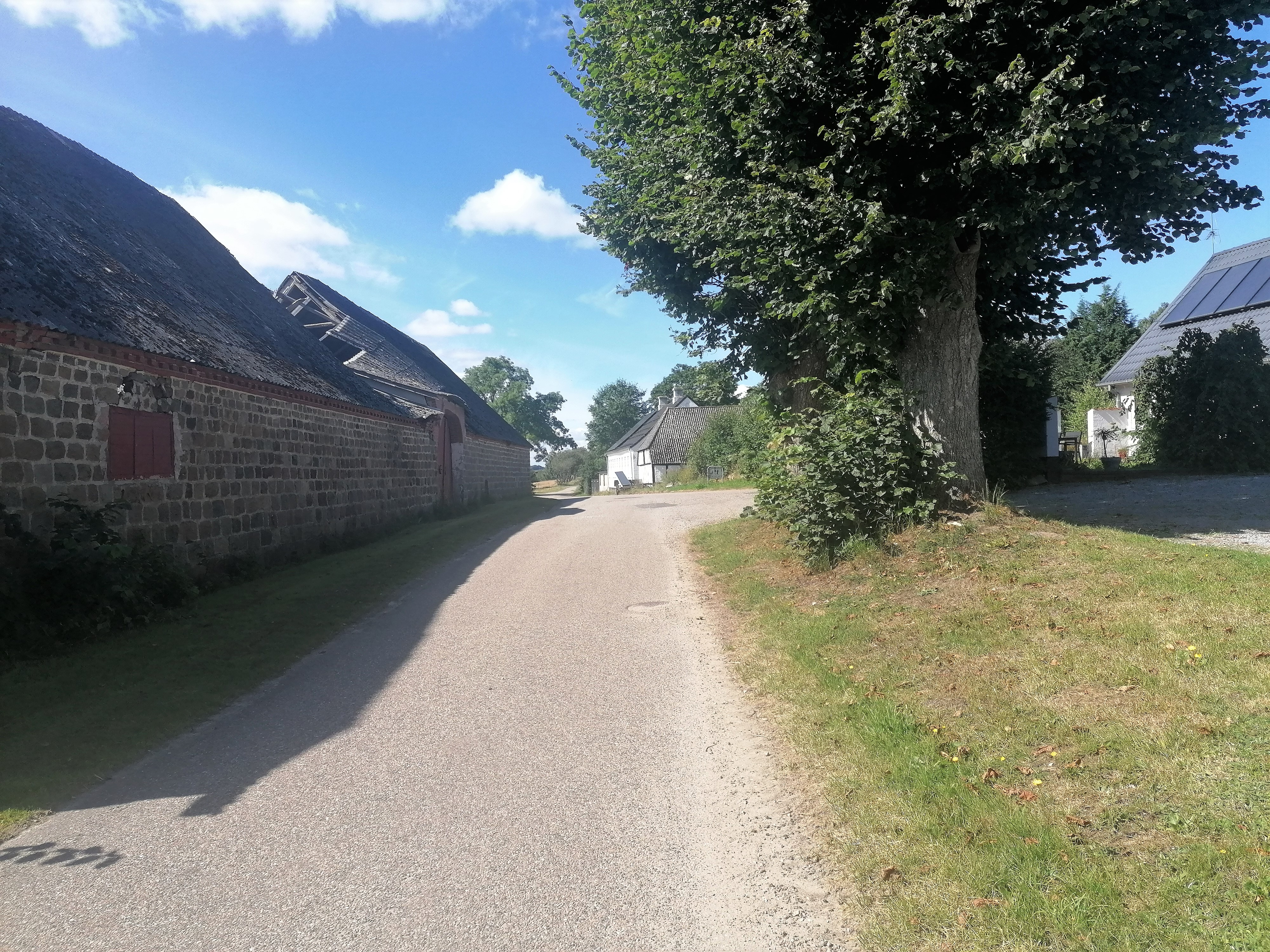 Øby set fra øst